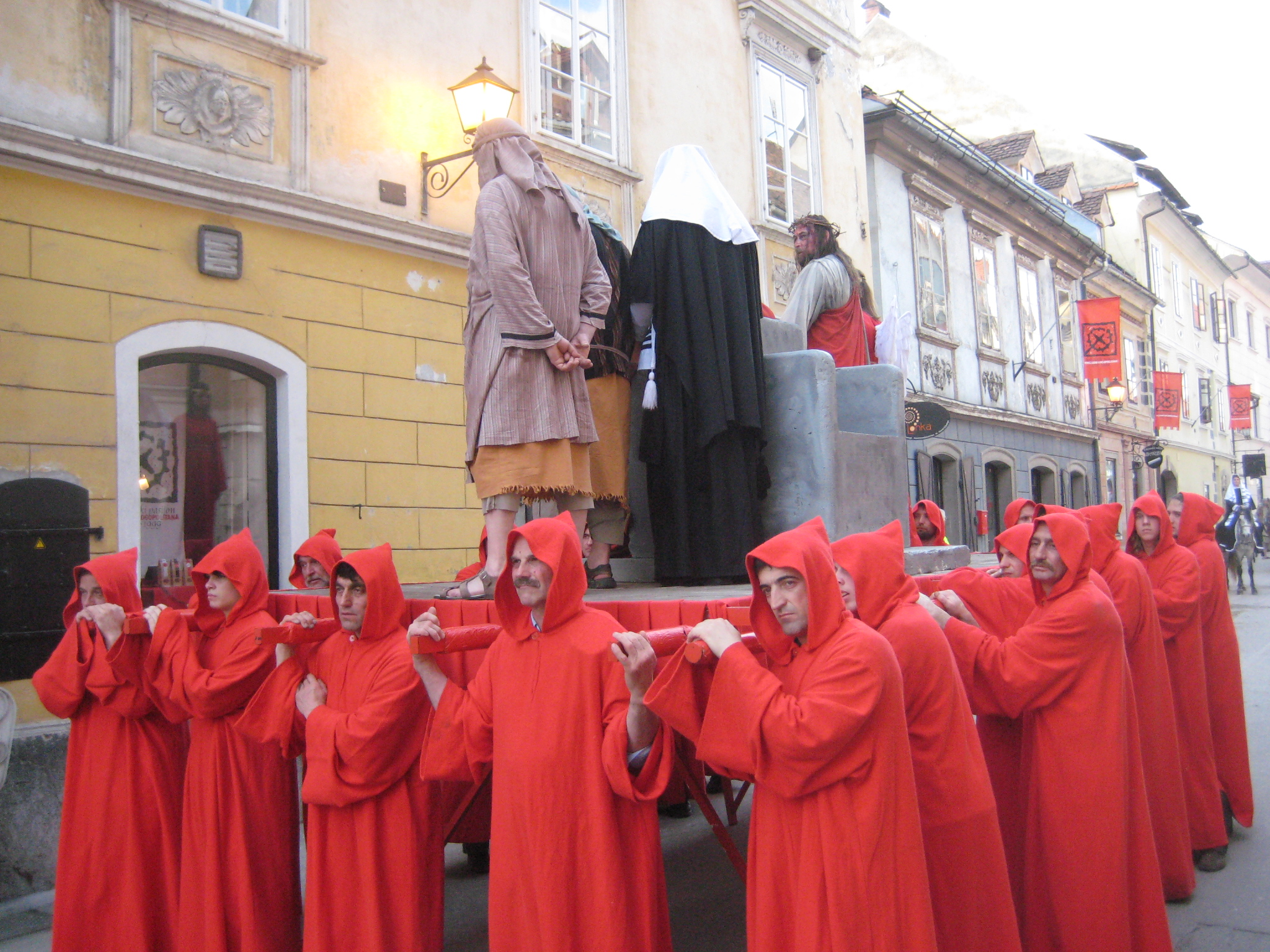 Škofjeloški pasijon (Processio Locopolitana), izvedba 2009 v Škofji Loki